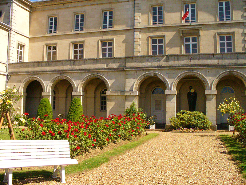 Centre EPIDE d'Alencon